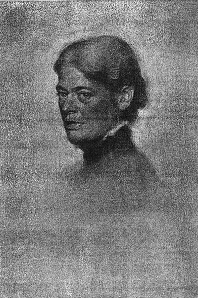 Portrait der Toni Neisser (Ehefrau von Albert Neisser)